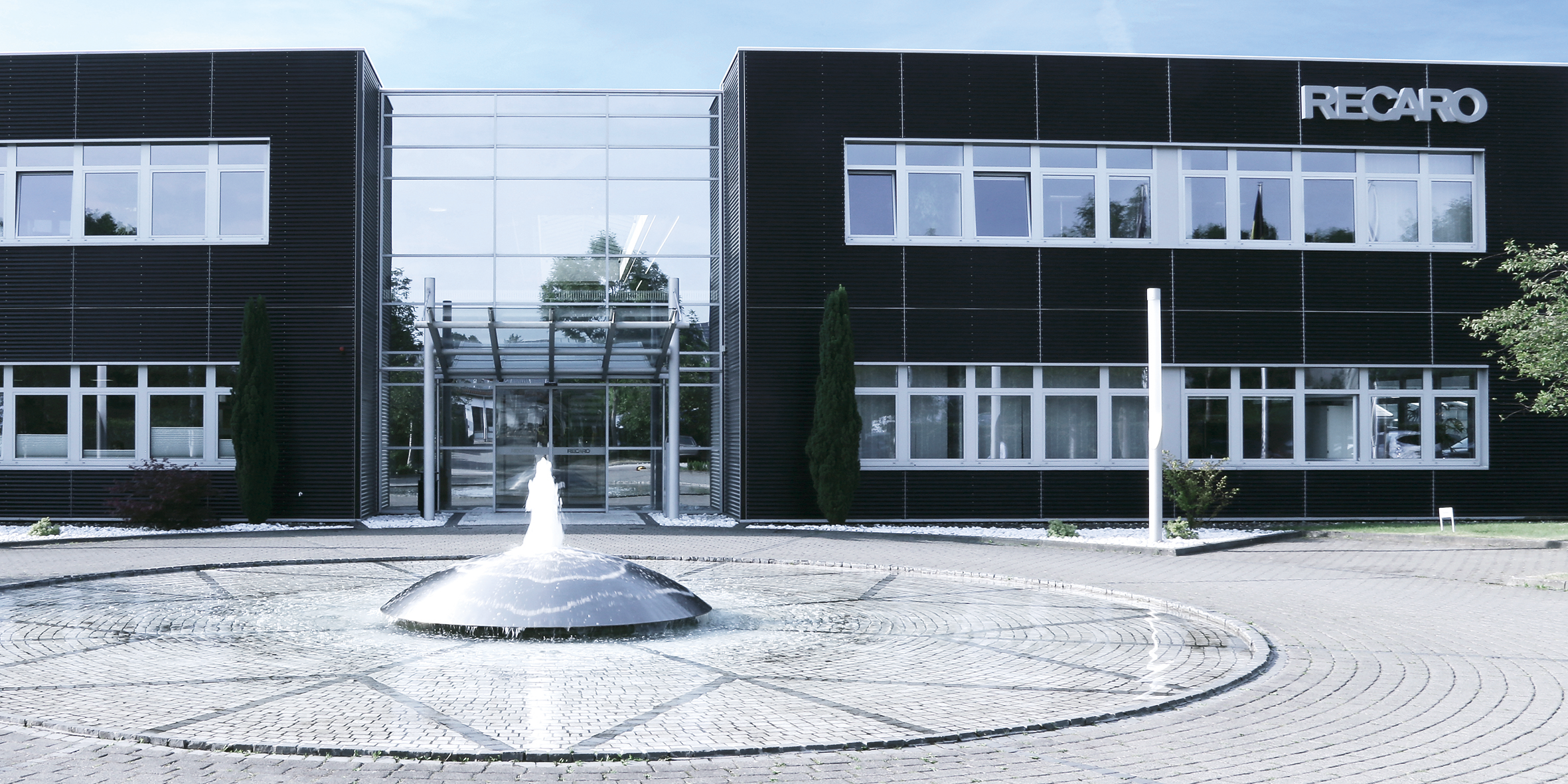 RECARO Firmengebäude am Standort Schwäbisch Hall Deutschland